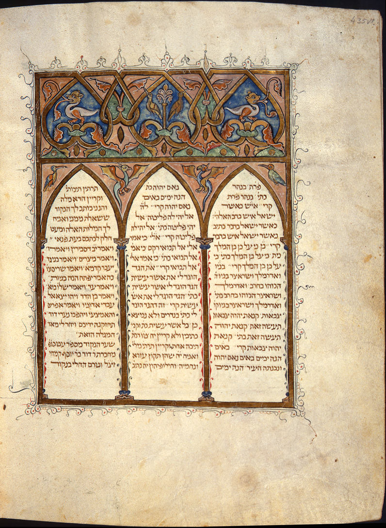 Bíblia de Cervera (fl 435v)